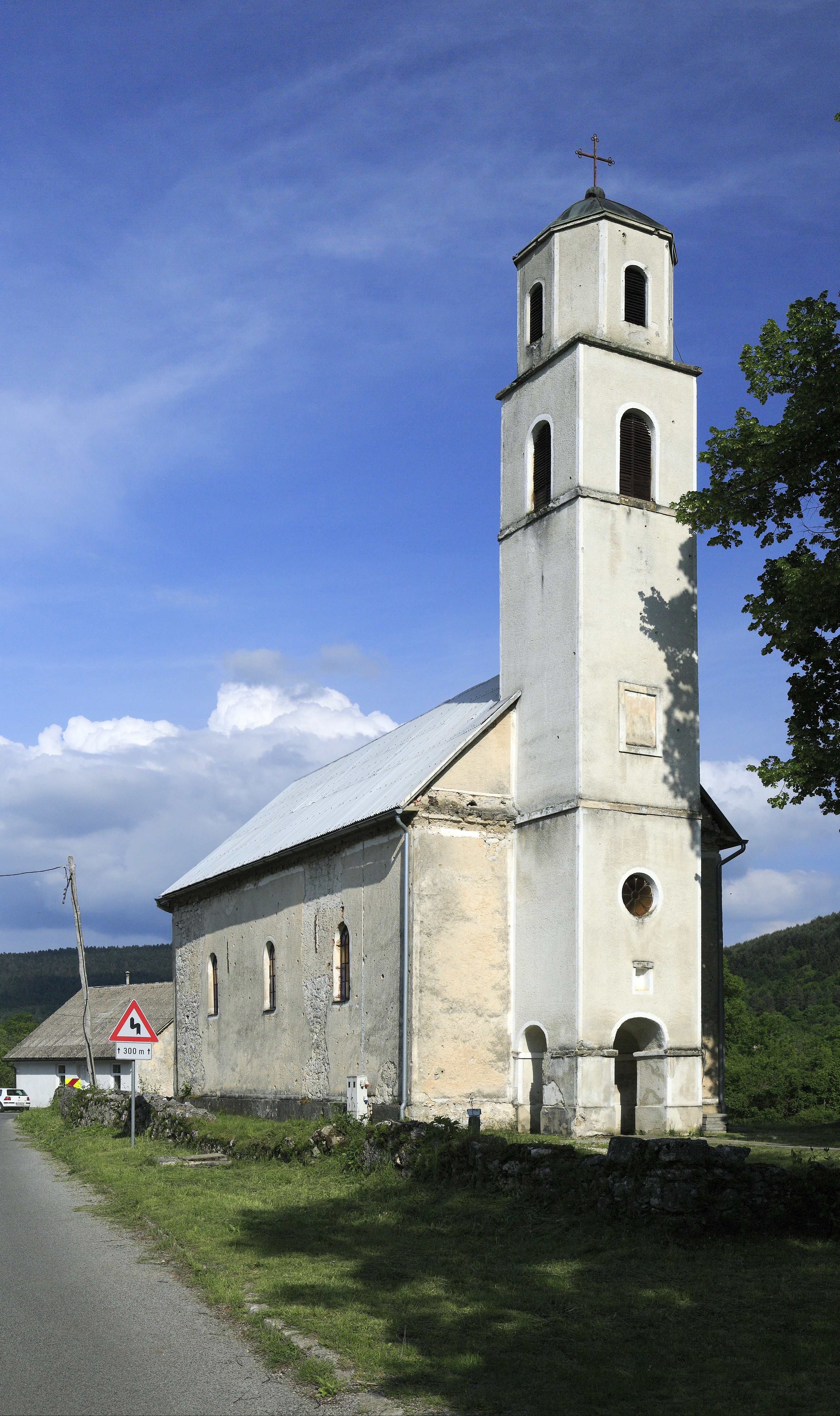 Lička Jesenica ist eine lockere Streusiedlung, auch das Gebiet um die Kirche macht nicht den Eindruck eines Ortszentrums.